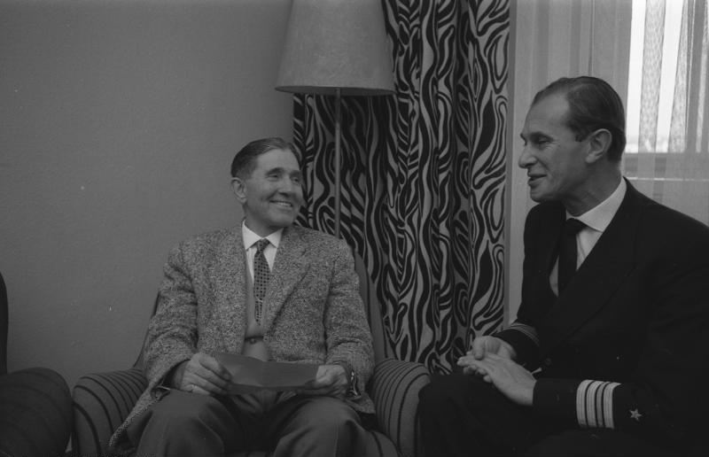 Pressekonferenz zum 50 Jahrestag der Seeschlacht (9.XI.1914) bei den Cocosinseln Bonn (links: Harms-Emden, der letzte Überlebende der SMS Emden)